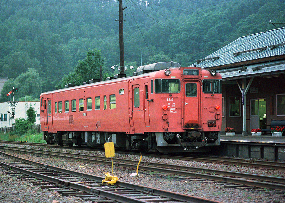 歌志内線 歌志内駅に停車中のキハ40 184